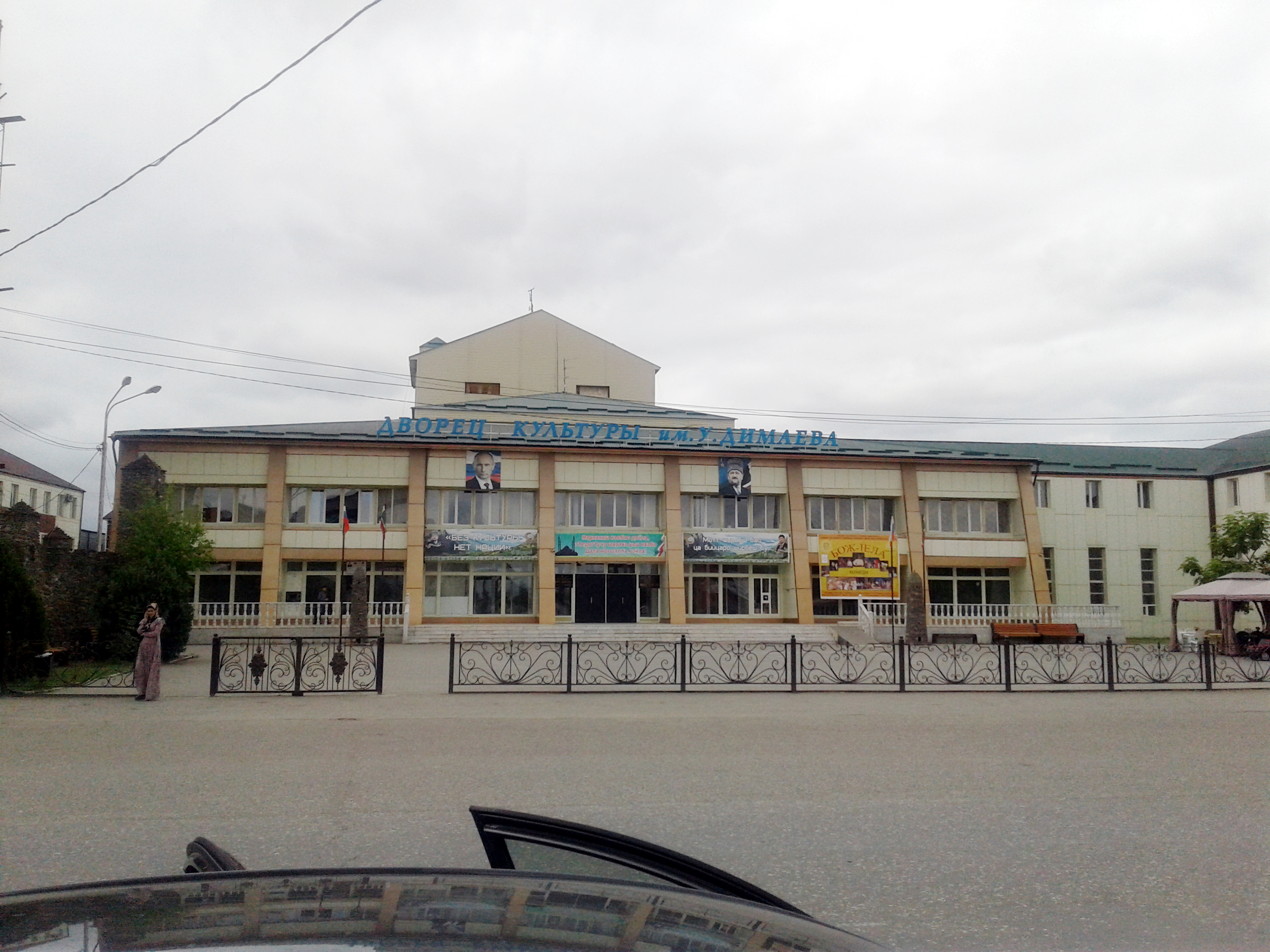 Дворец культуры имени Умара Димаева в Урус-Мартане